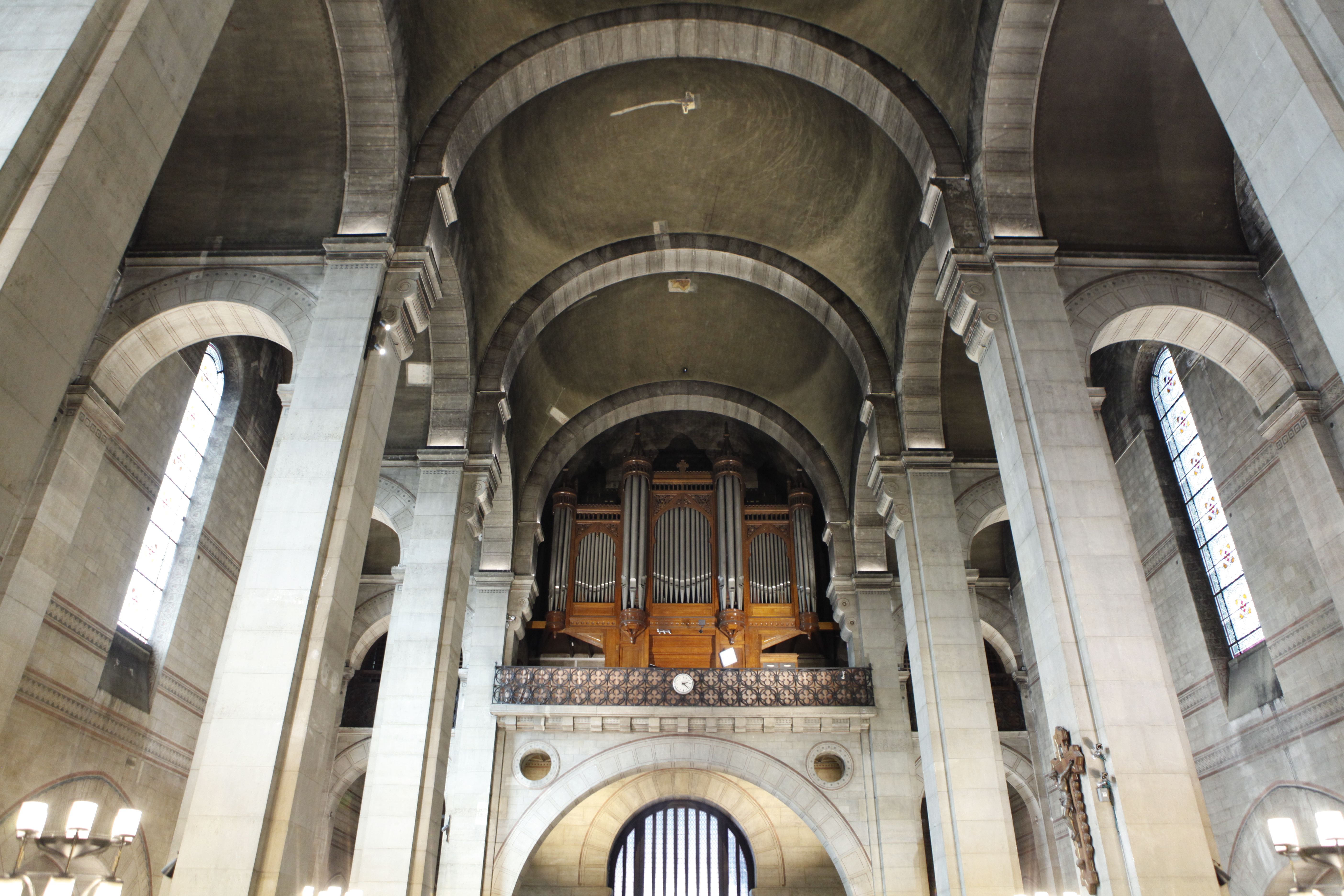 Eglise Notre Dame d'Auteuil